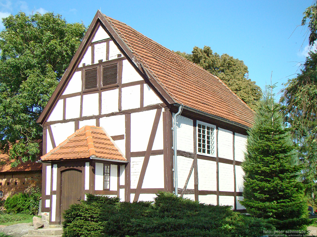 Dorfkirche in Altenhagen, Lkr. Demmin